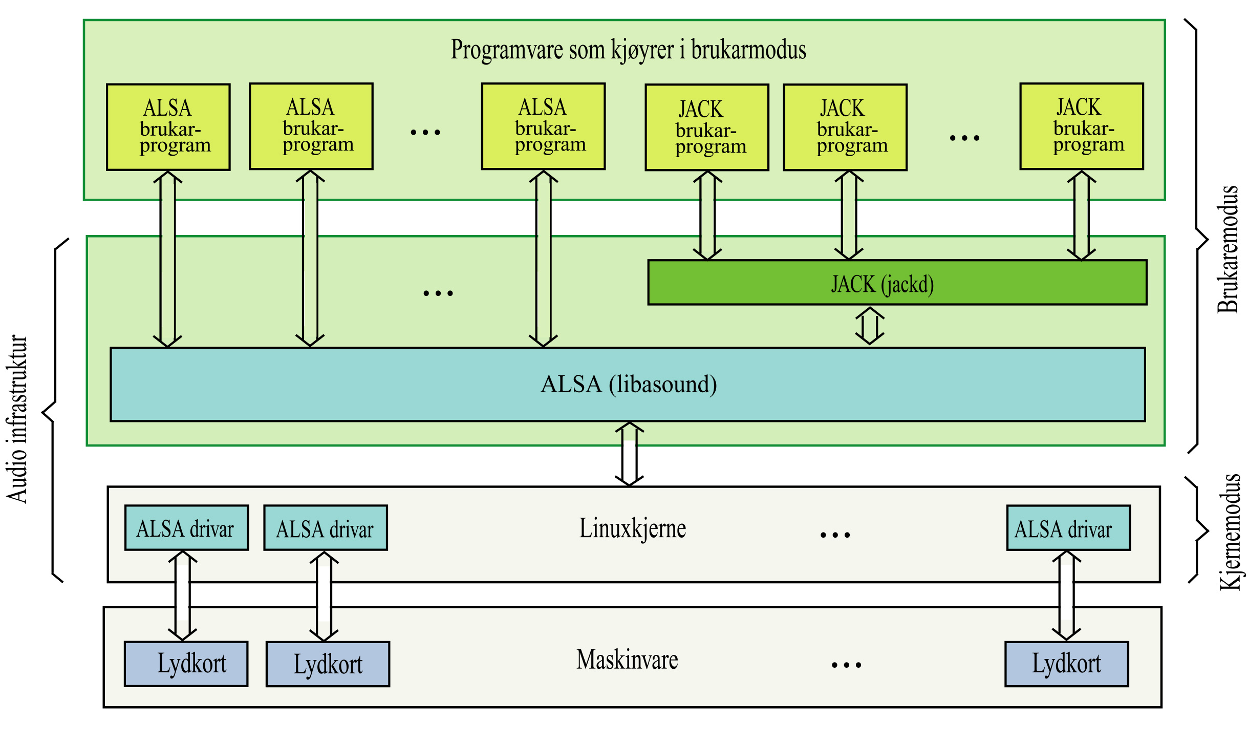 ALSA arkitekur. ALSA er eit audiolågnivågrensesnitt med nokre modular som køyrer i kjerne- og andre som køyrer i brukarmodus. Advanced Linux Sound Architecture, Audiolågnivågrensesnitt, Linux-audio-infrastruktur.